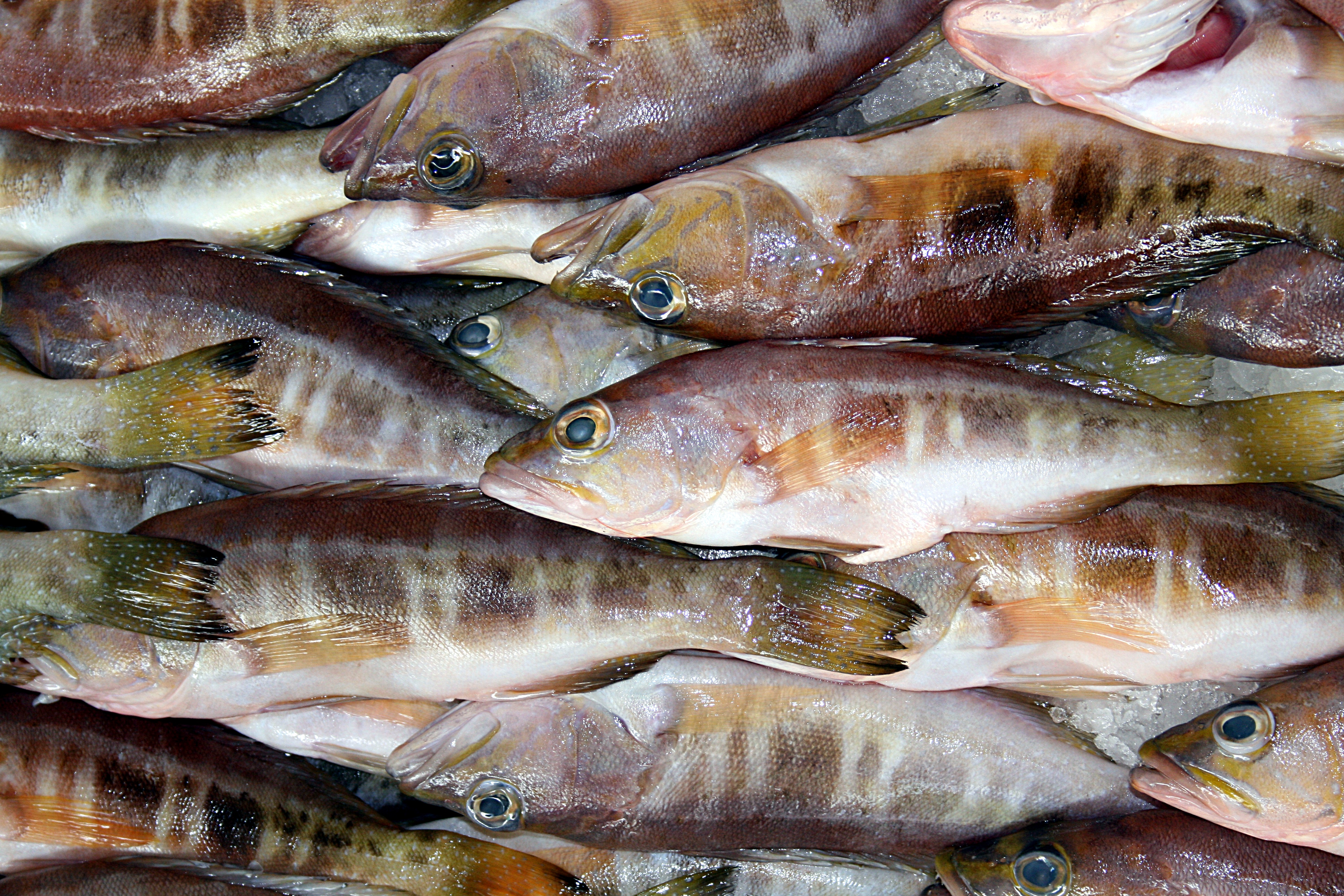 Funchal_Markthalle 1717